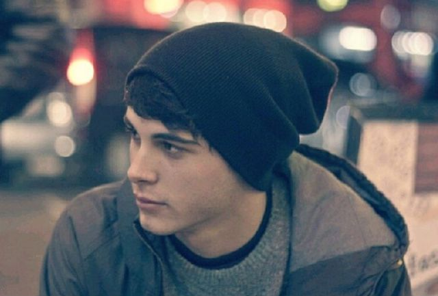 Fotografia del actor David Solans